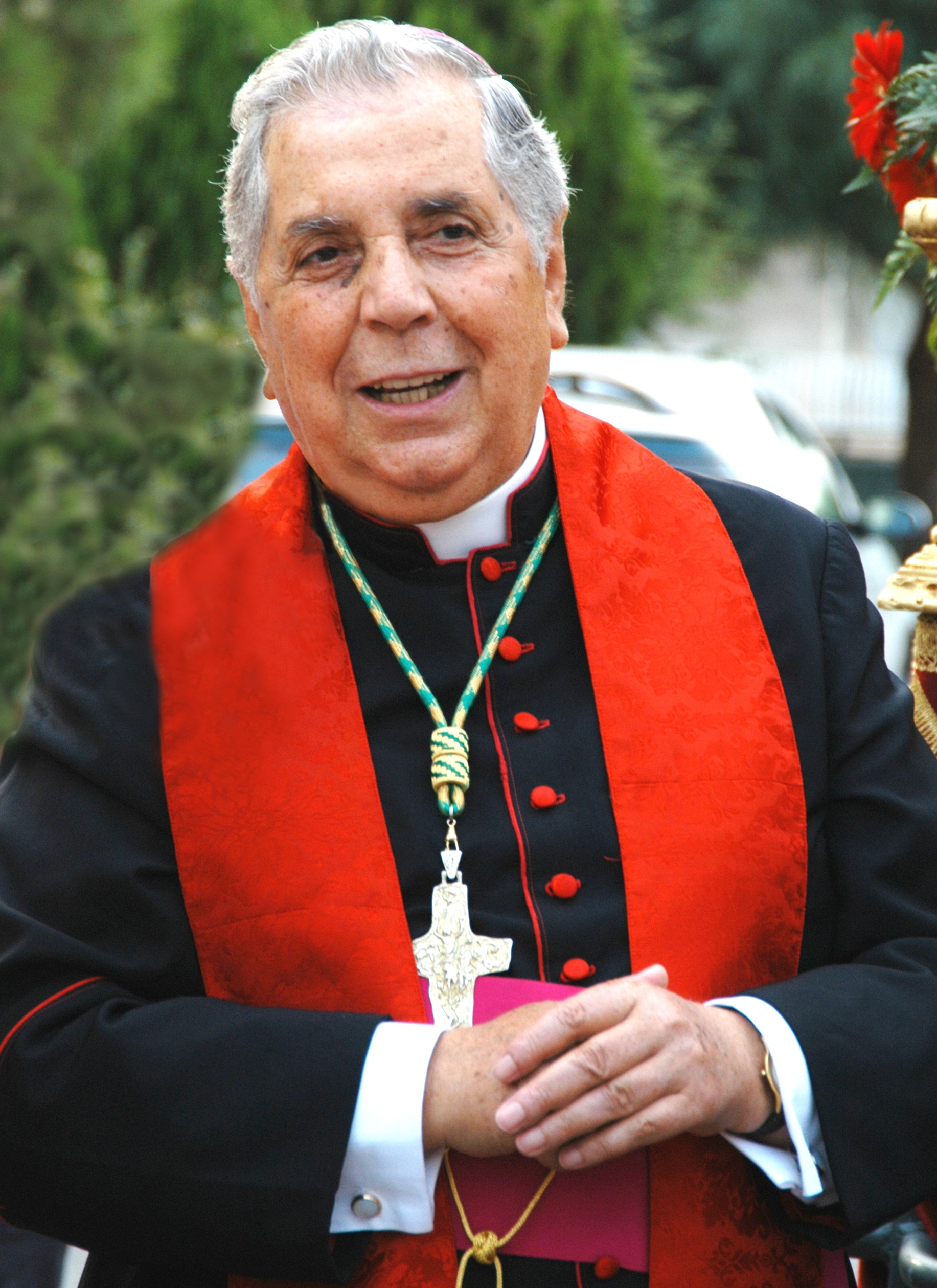 Autore e Fonte: Nicolò Fiorenza, Descrizione: Mons. Luigi Bommarito Arcivescovo Metropolita di Catania, a Catenanuova il 4 settembre 2005, Licenza D'Uso